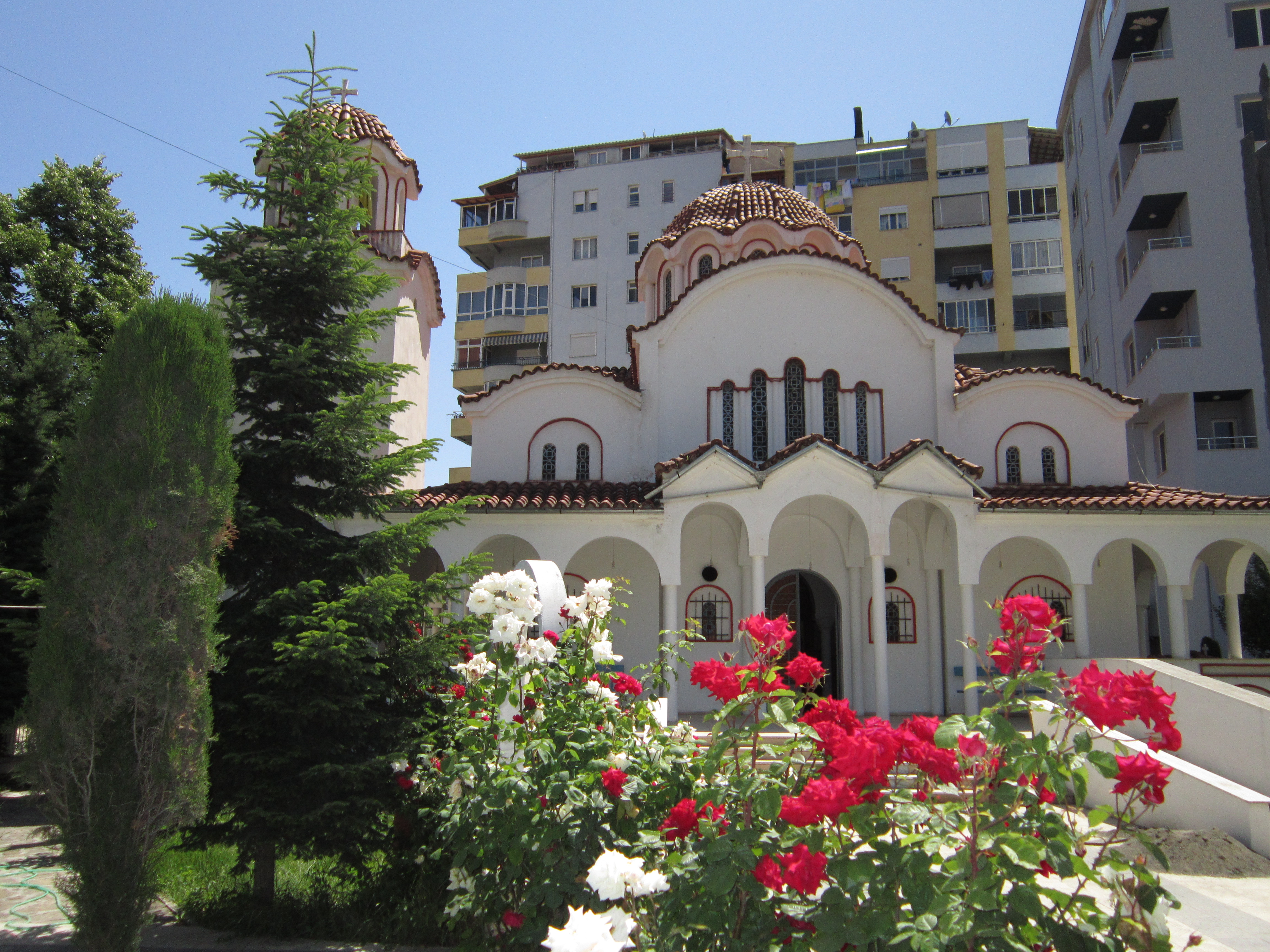 Kishë Ngjallja e Krishtit